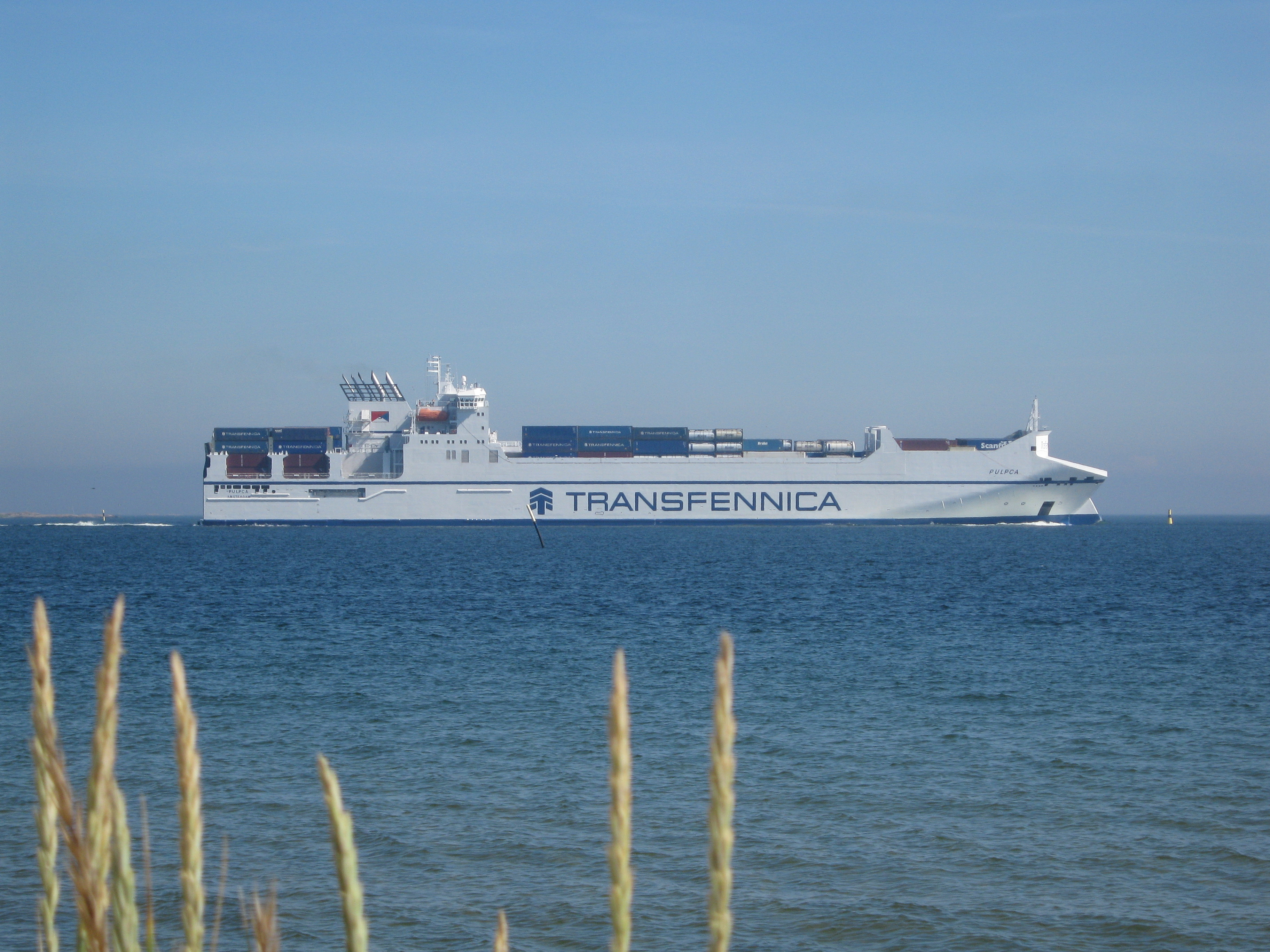 Transfennican rahtilaiva M/S Pulpca lähdössä Hangon satamasta